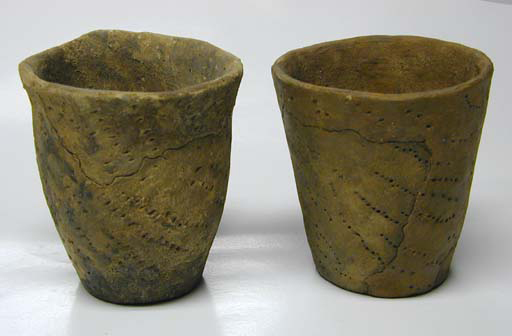 Två olika exemplar av keramikkärl från senneolitikum, södra Sverige. Keramikkärlen är kopior av fynd från Lusthushögens gånggrift (RAÄ-nr Falköping 19:1) i stadsdelen Ranten, Falköpings stad, Falköpings kommun, f.d. Skaraborgs län, Västergötland, Västra Götalands län, Sverige. Originalen finns på Statens Historiska Museum i Stockholm och har där inventarienummer SHM 4034:b. Kopiorna på bilden tillhör Falbygdens museum i Falköping och har där inventarienummer 1614:1-2 (2M16-F1614-01 och 2M16-F1614-02).